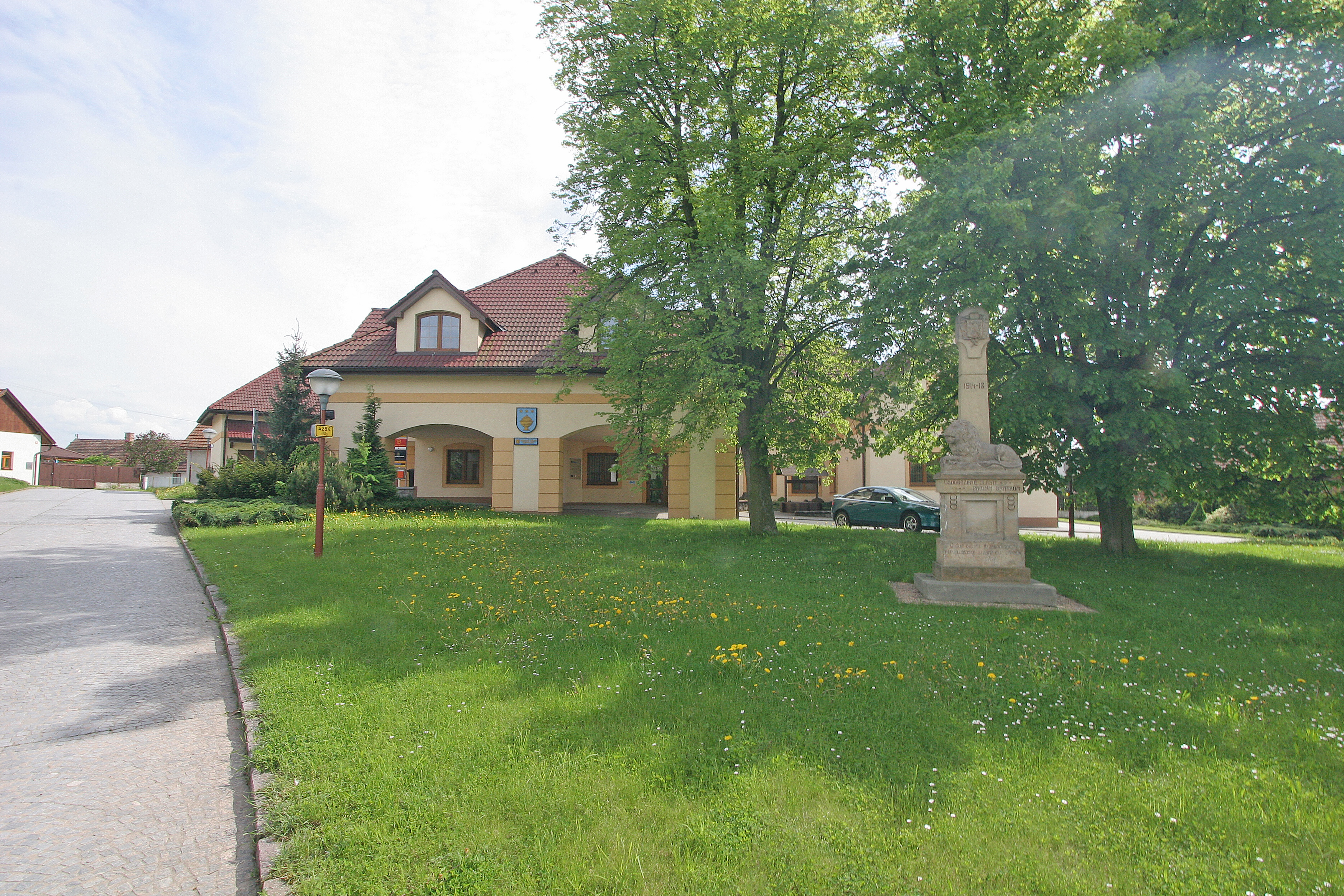 Nepolisy obecní úřad